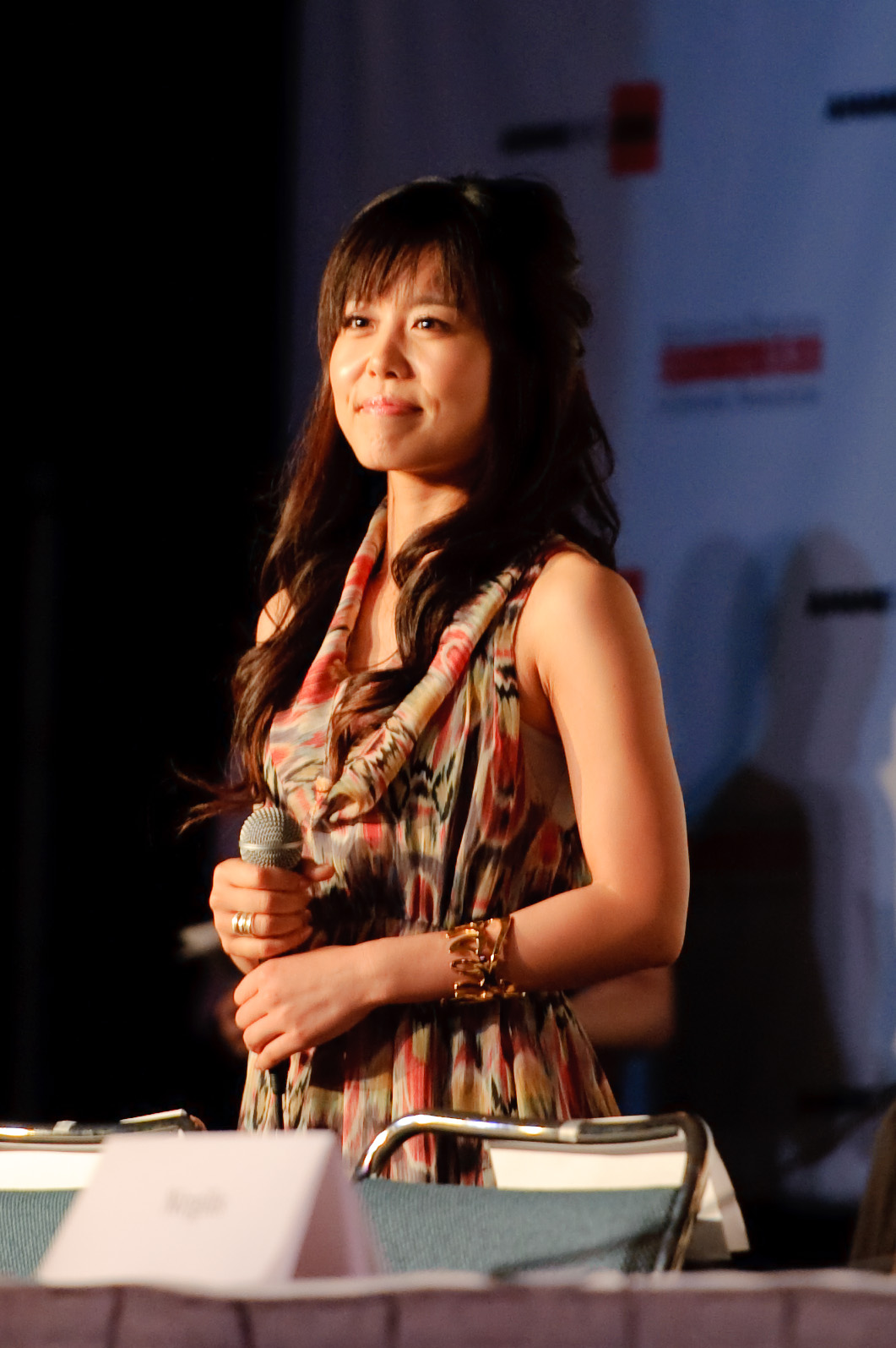 Miyuki Sawashiro at Anime Expo 2011.